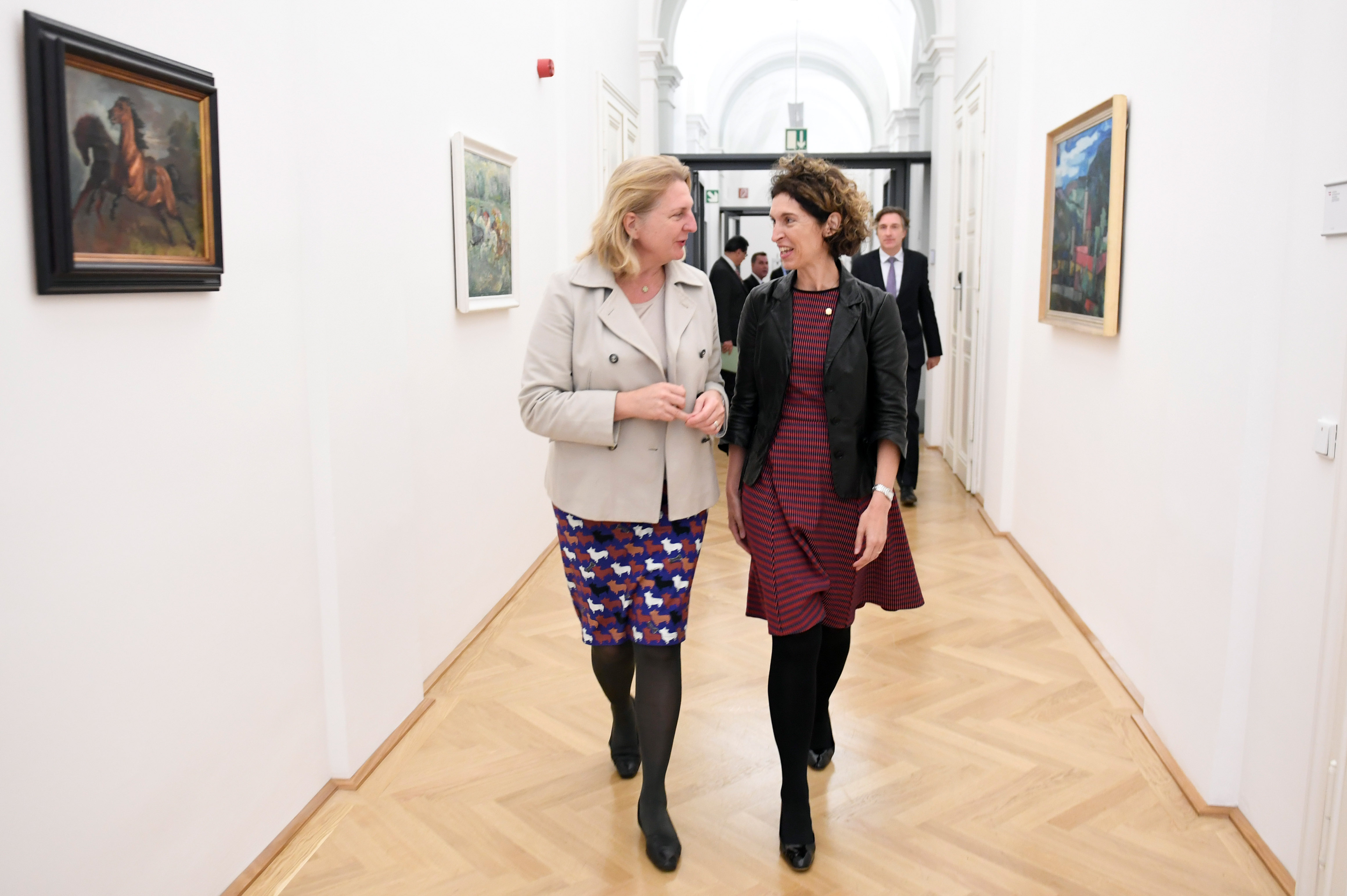 Die österreichische Außenministerin Karin Kneissl trifft die Außenministerin von Andorra Maria Ubach Font in Wien am 30. Oktober 2018.